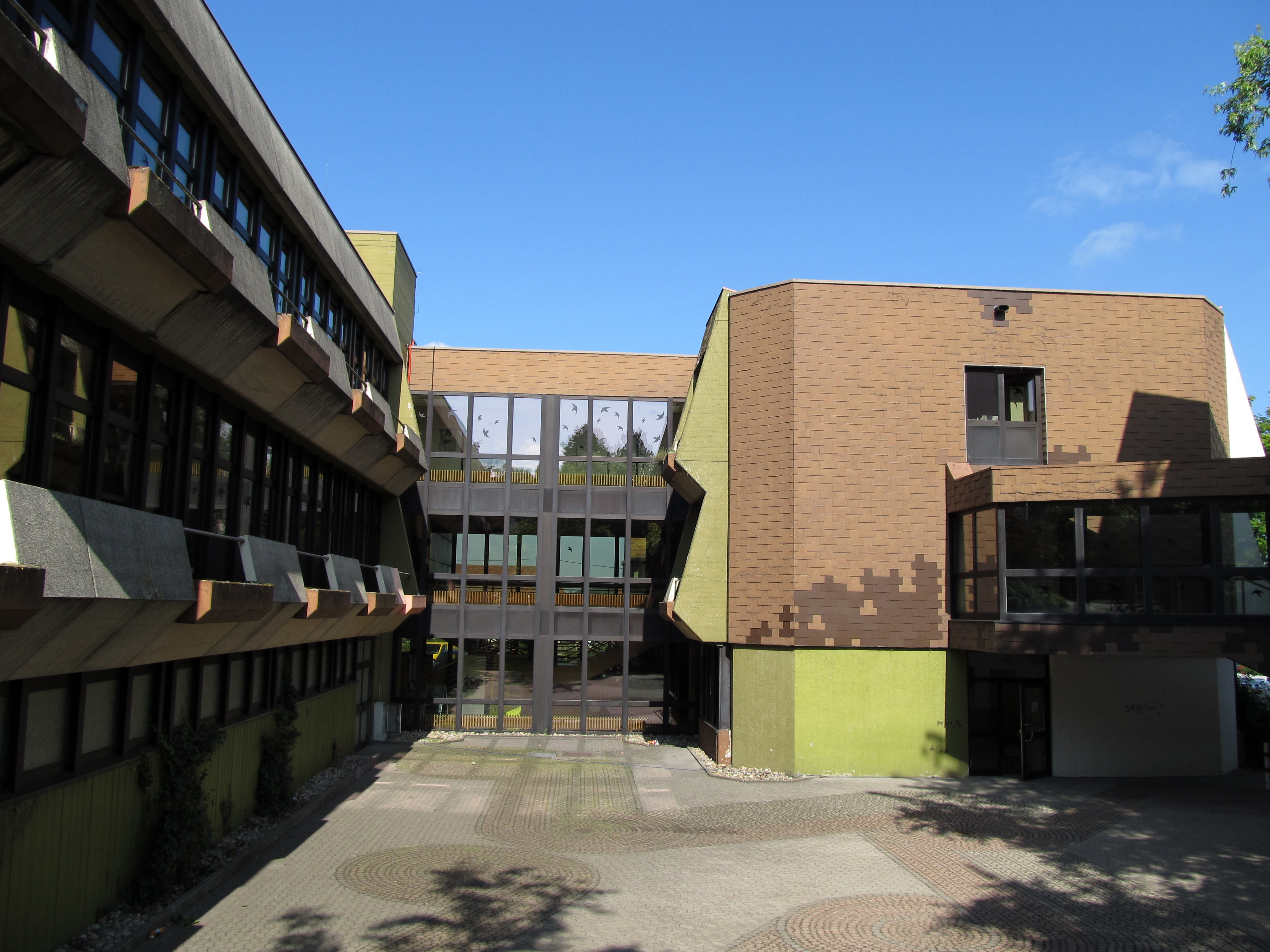 Das Rathaus der Gemeinde Mandelbachtal in Ormesheim, Saarland